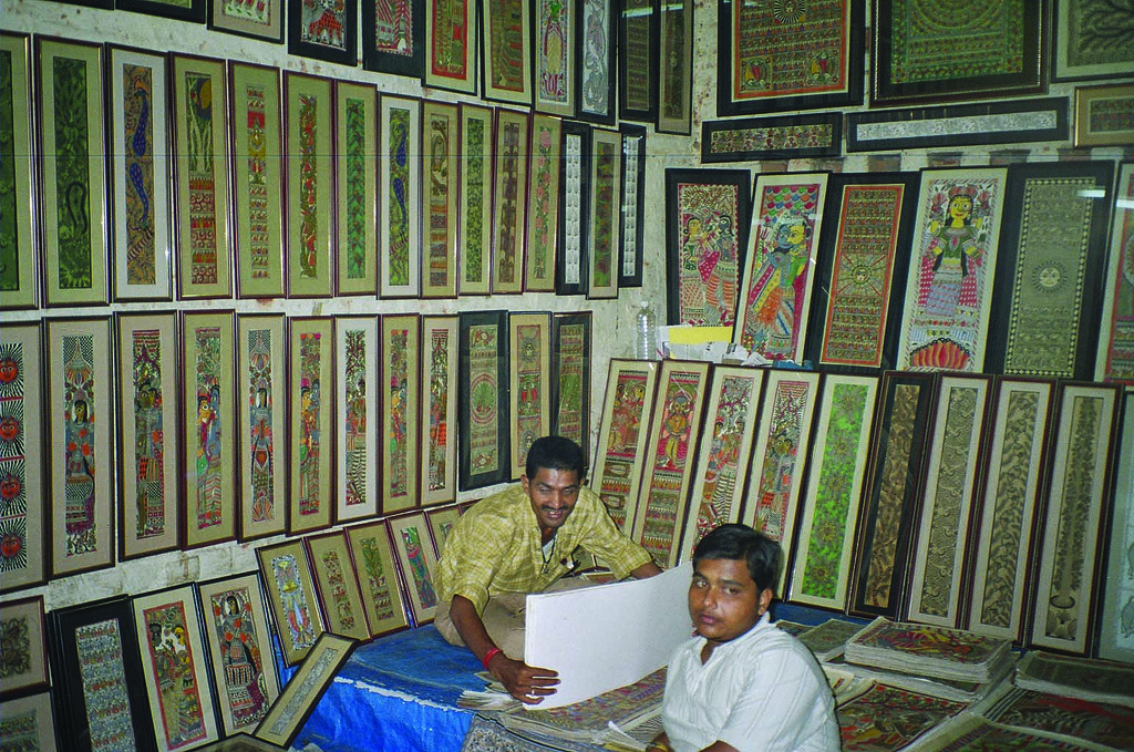 Dilli Haat. 10/14/06.